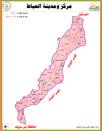 حدود المركز